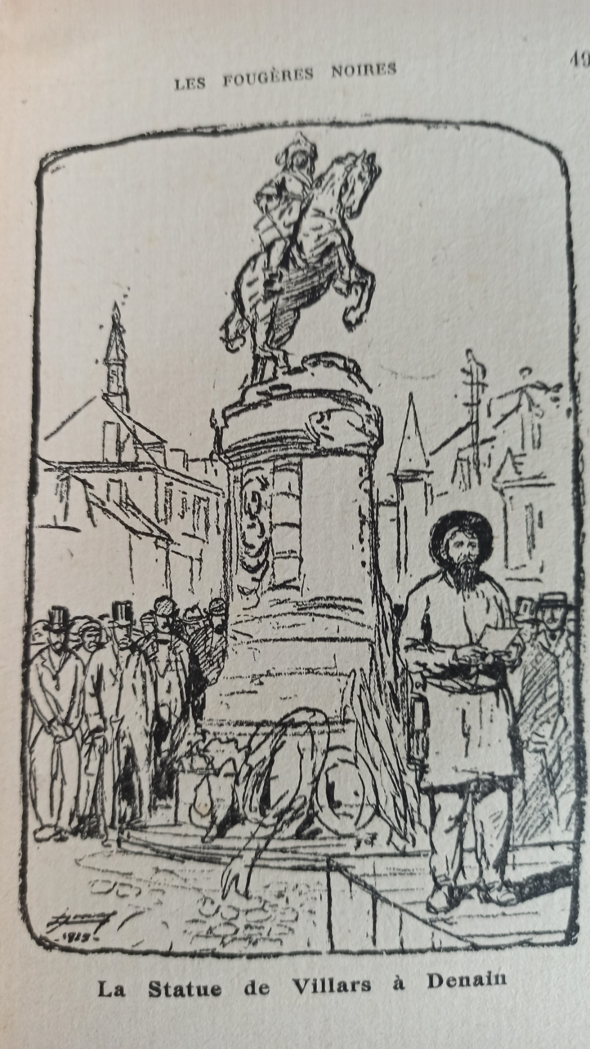 Dessin de Lucien Jonas représentant Jules Mousseron lors de l'inauguration le 13 juillet 1918 de la satue du maréchal Villard à Denain. Dessin en page 49 de "Les Fougéres noires" 1926 de Jules Mousseron